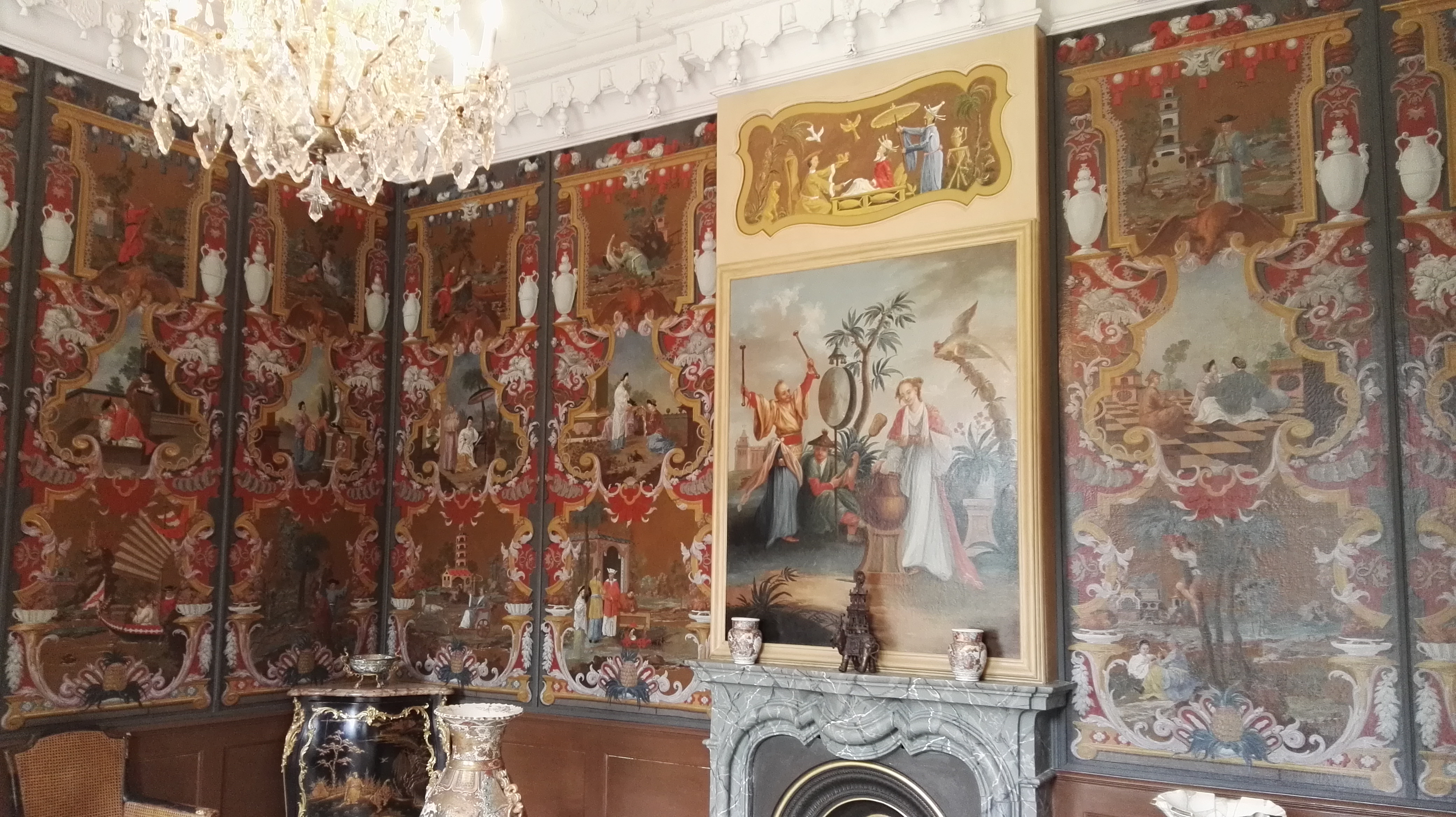 Zimmer im Barockschloss Rammenau